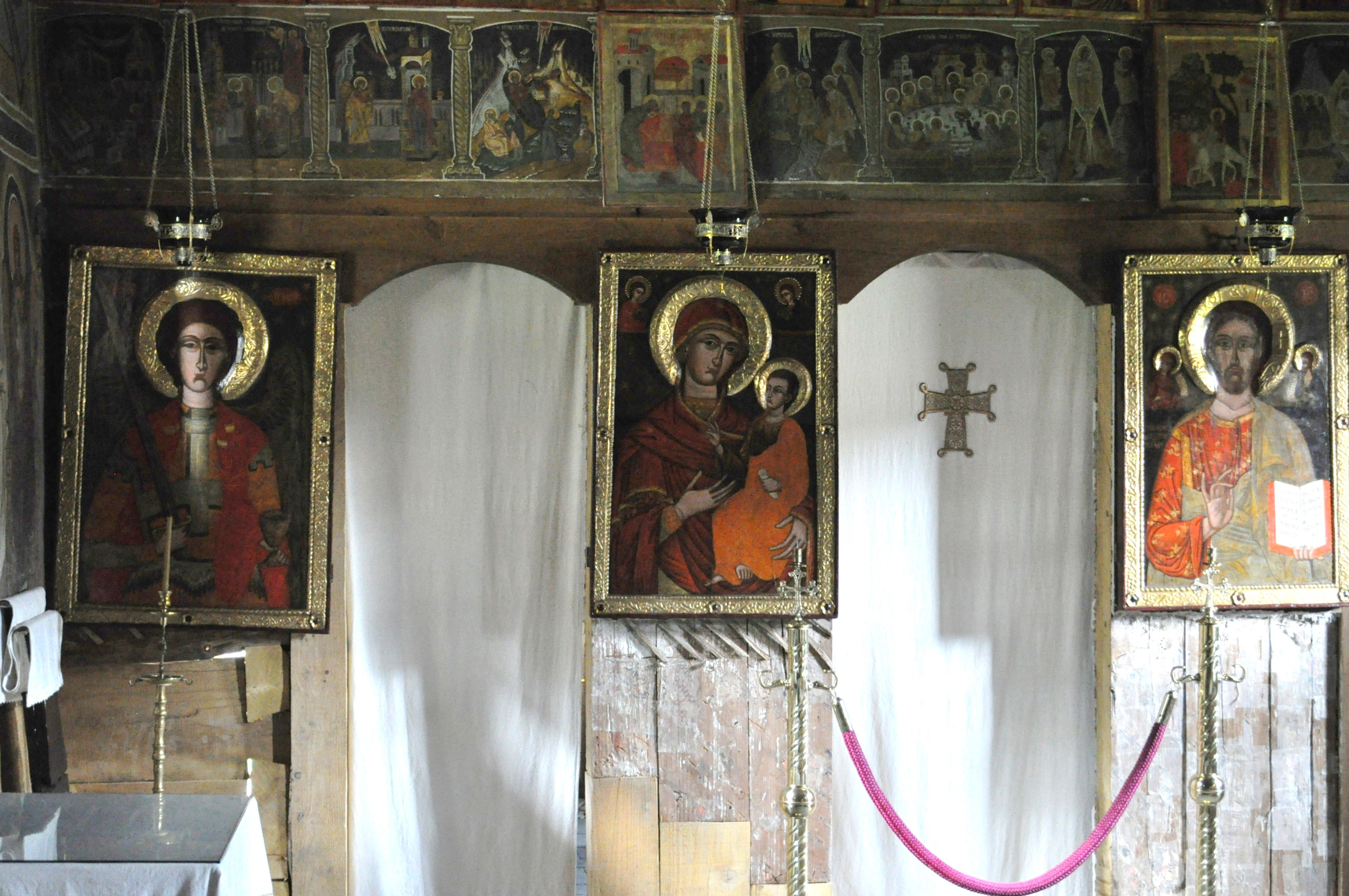 Biserica de lemn "Sf. Nicolae" a mănăstirii Lupşa, sat VALEA LUPŞII; comuna LUPŞA